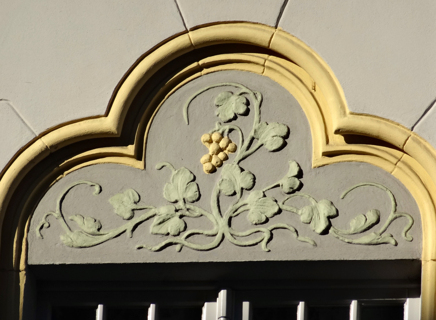 Kamienica przy ul. Cieszkowskiego 11 w Bydgoszczy (1898-1899 Józef Święcicki)